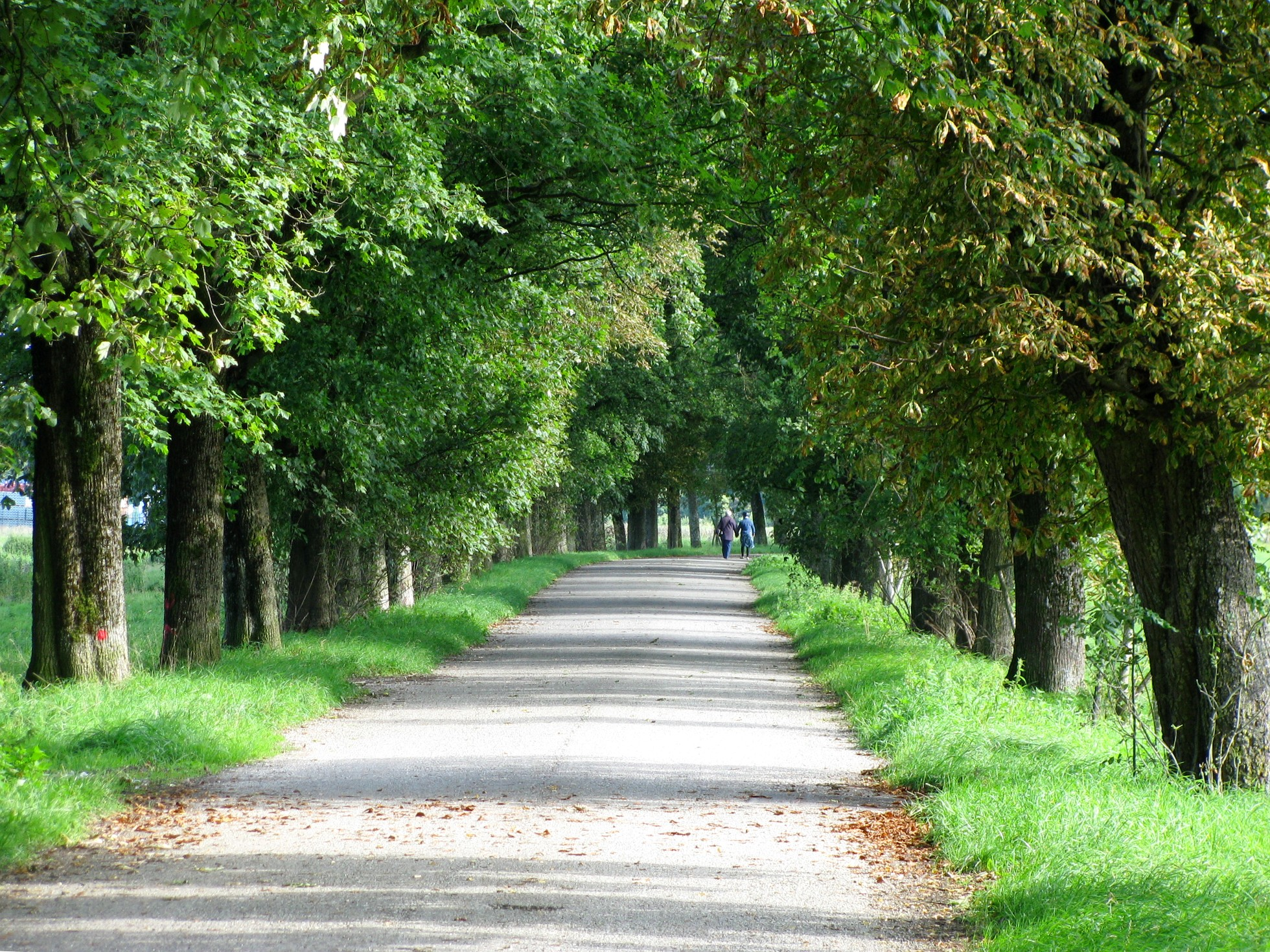 Freihamer Allee südlich von Gut Freiham; Ahorne und vereinzelte Kastanien